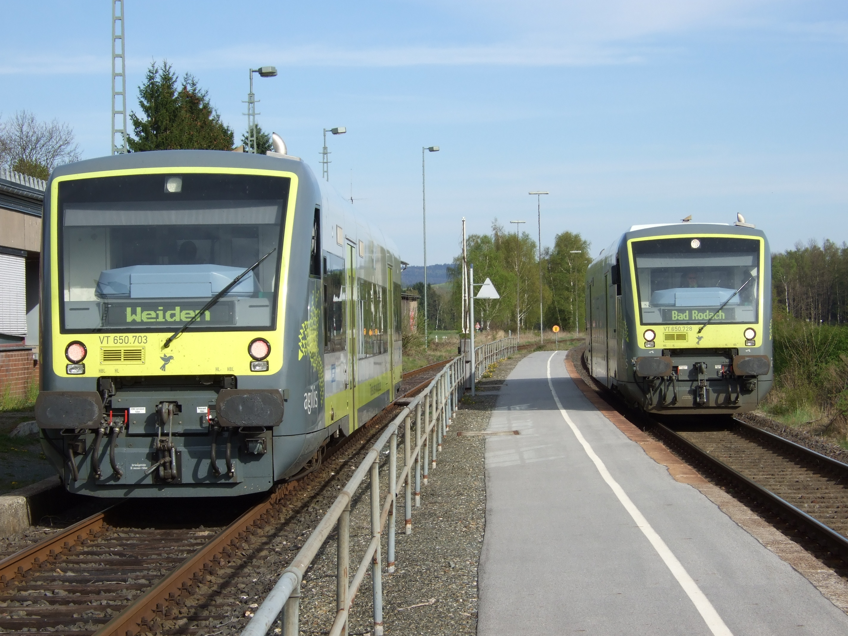 Kreuzung zweier Agilis-Triebwagen im Bahnhof Kemnath-Neustadt